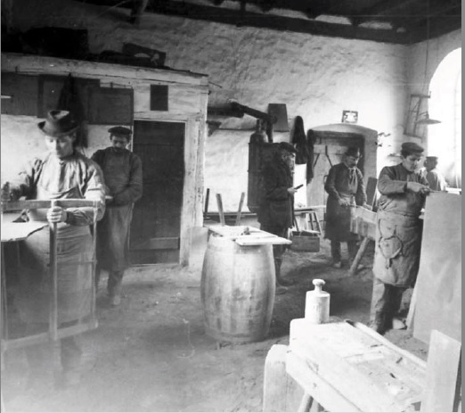 Bearbeiten von Schiefer Übertage in Nuttlar um 1900